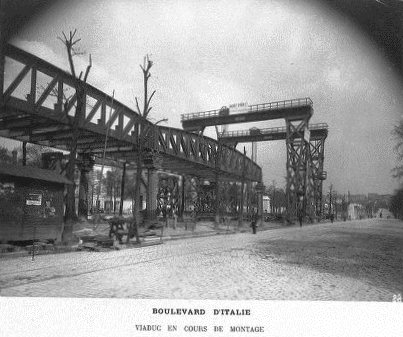 Construction du chemin de fer métropolitain municipal de Paris. Boulevard d'Italie, viaduc en cours de montage. [cote : PH451A]